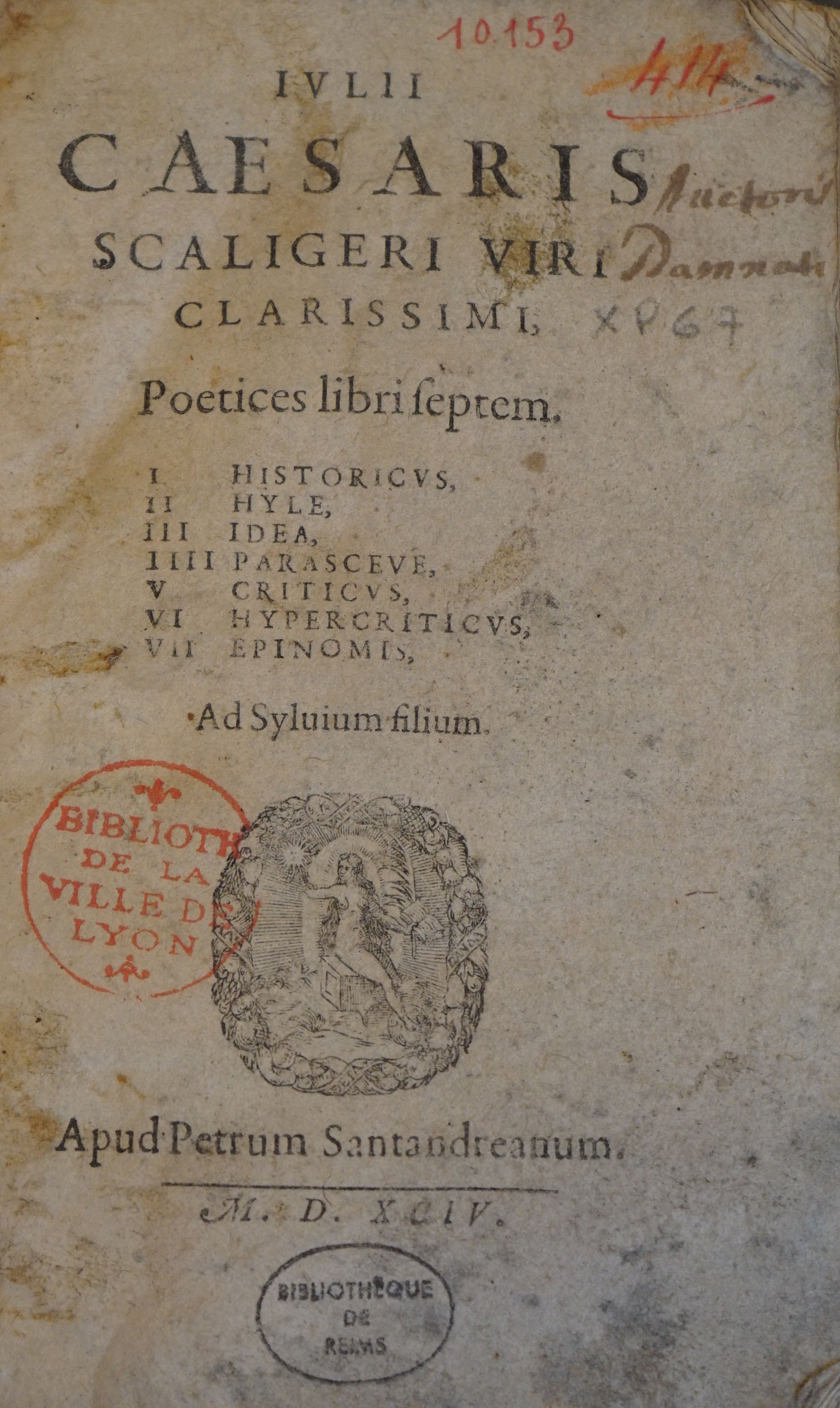 partie du "Poetices libri septem".